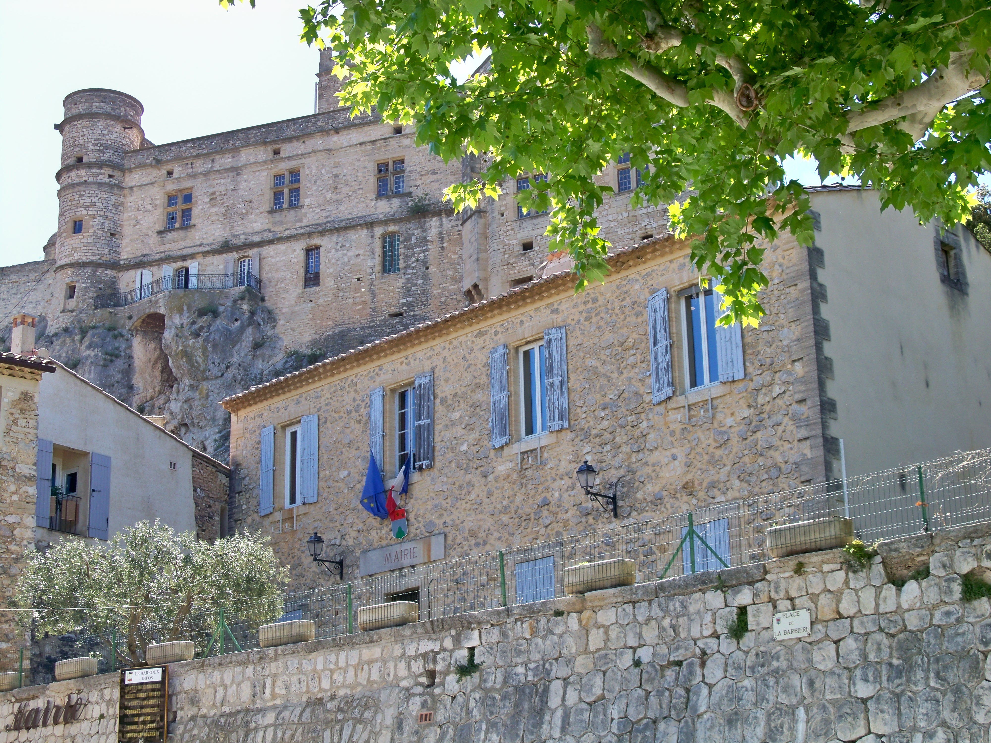 mairie du Barroux